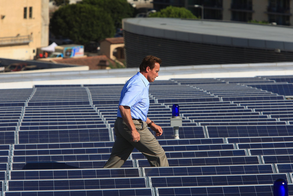 Arnold Schwarzenegger, Gobernador California (EEUU), en una Planta Solar Fotovoltaica